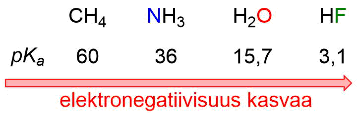 Elektronegatiivisuuden vaikutus happovoimakkuuteen yhdisteillä CH4, NH3, H2O ja HF